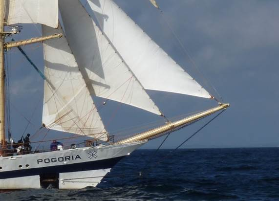 Część dziobowa STS Pogoria